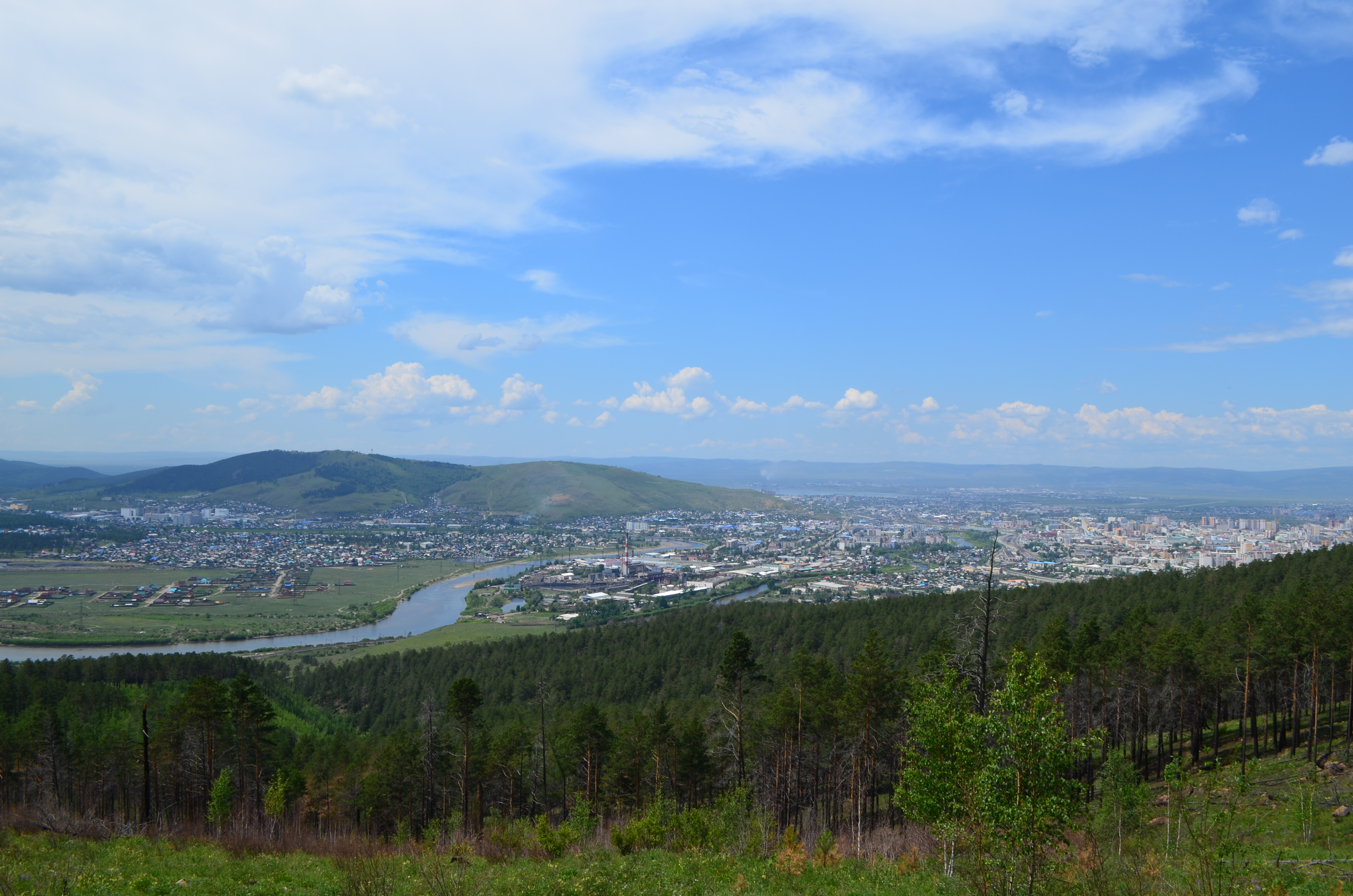 снимки конца июня - начала июля 2015 г.